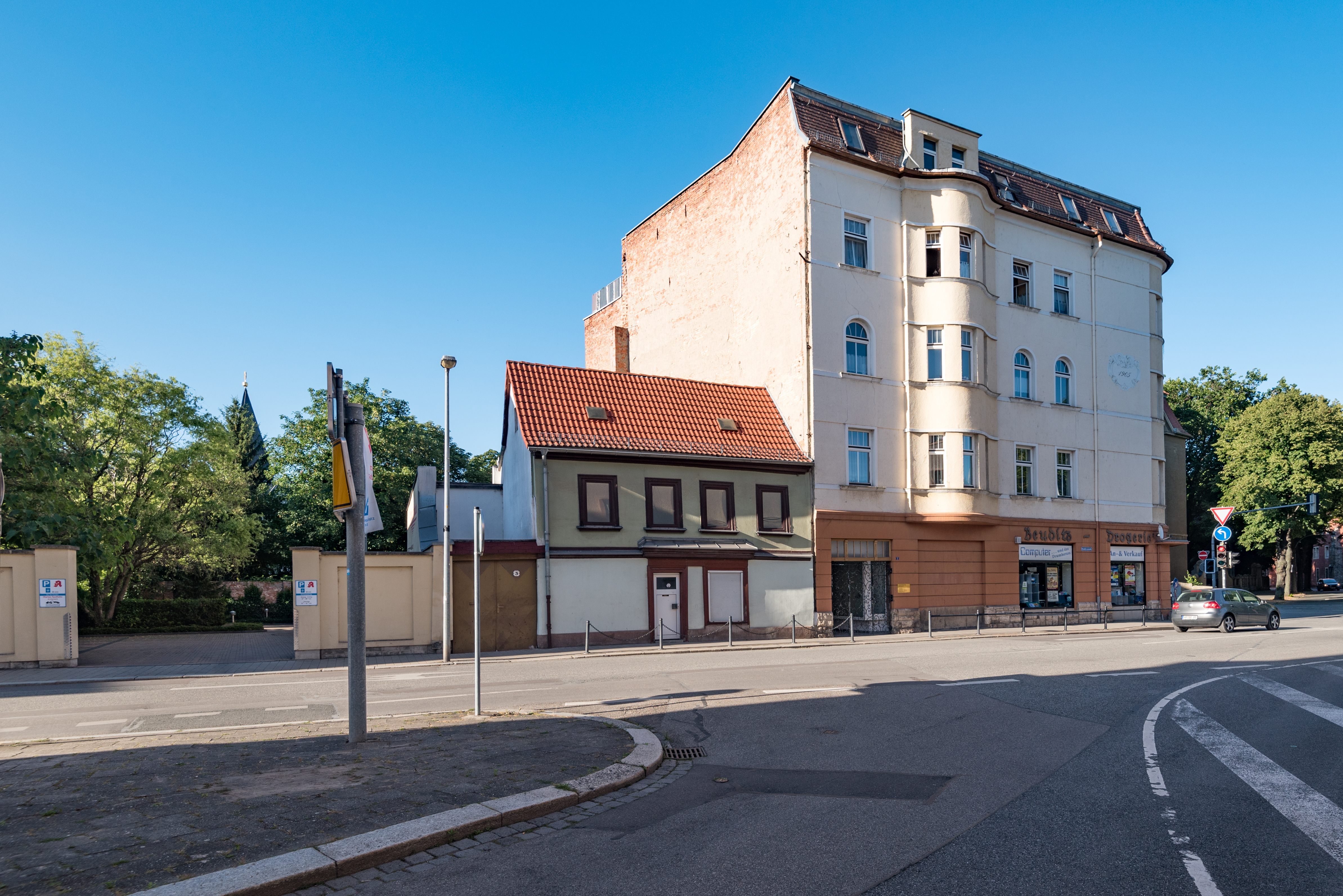 Weißenfels, Beuditzstraße 3, 1